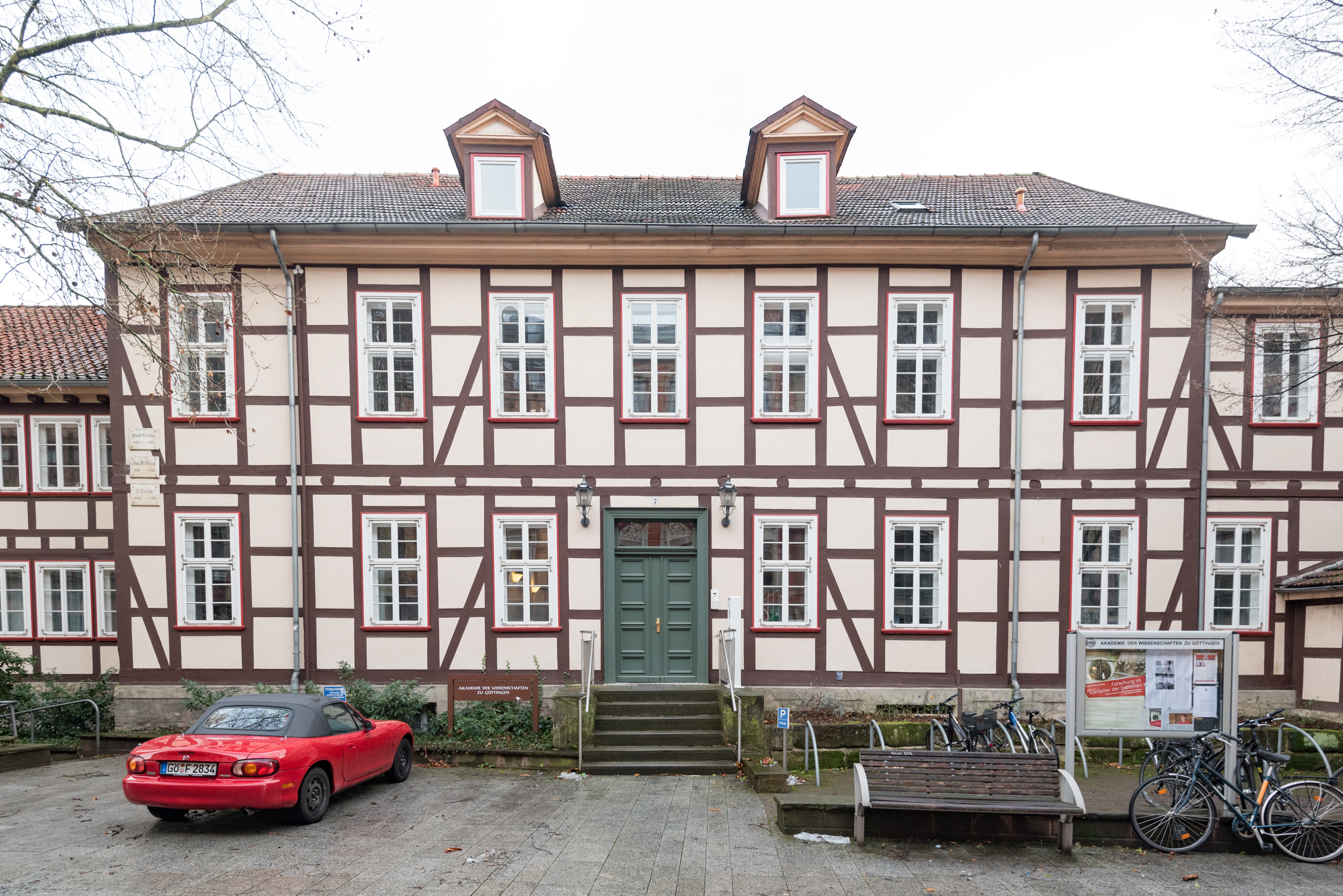 Göttingen: Theaterstraße 7